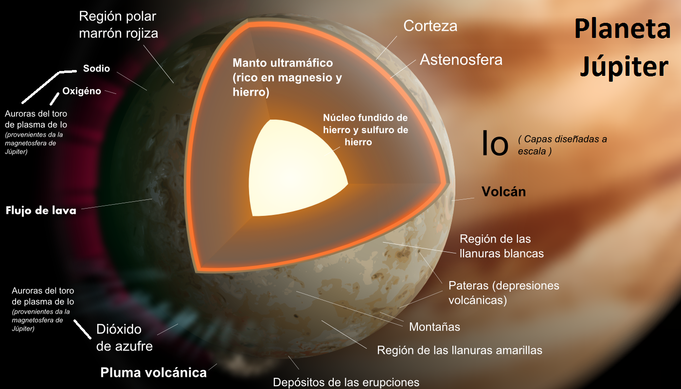 木卫一的内部结构（木星的卫星）